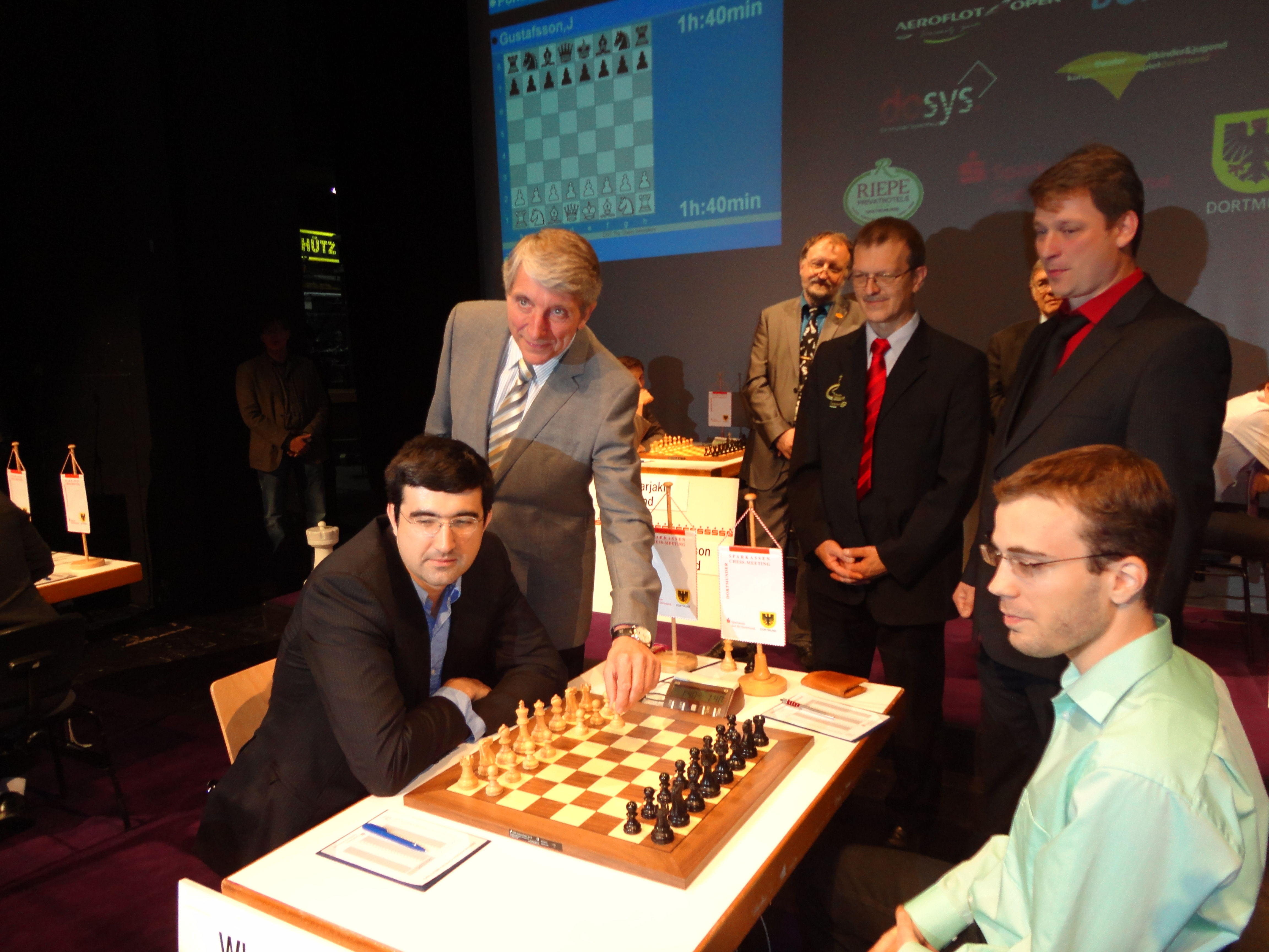 Bei der Partie "Kramnik - Meier" in Runde 9 führt der Geschäftsführer vom "Ringhotel Drees" (Sponsor der Schachtage) den ersten Zug aus. In der Mitte Herbert Bastian, Präsident des Deutschen Schachbundes. , Dortmunder Schachtage 2012.